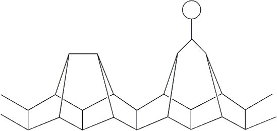 Struktur von violettem Phosphor